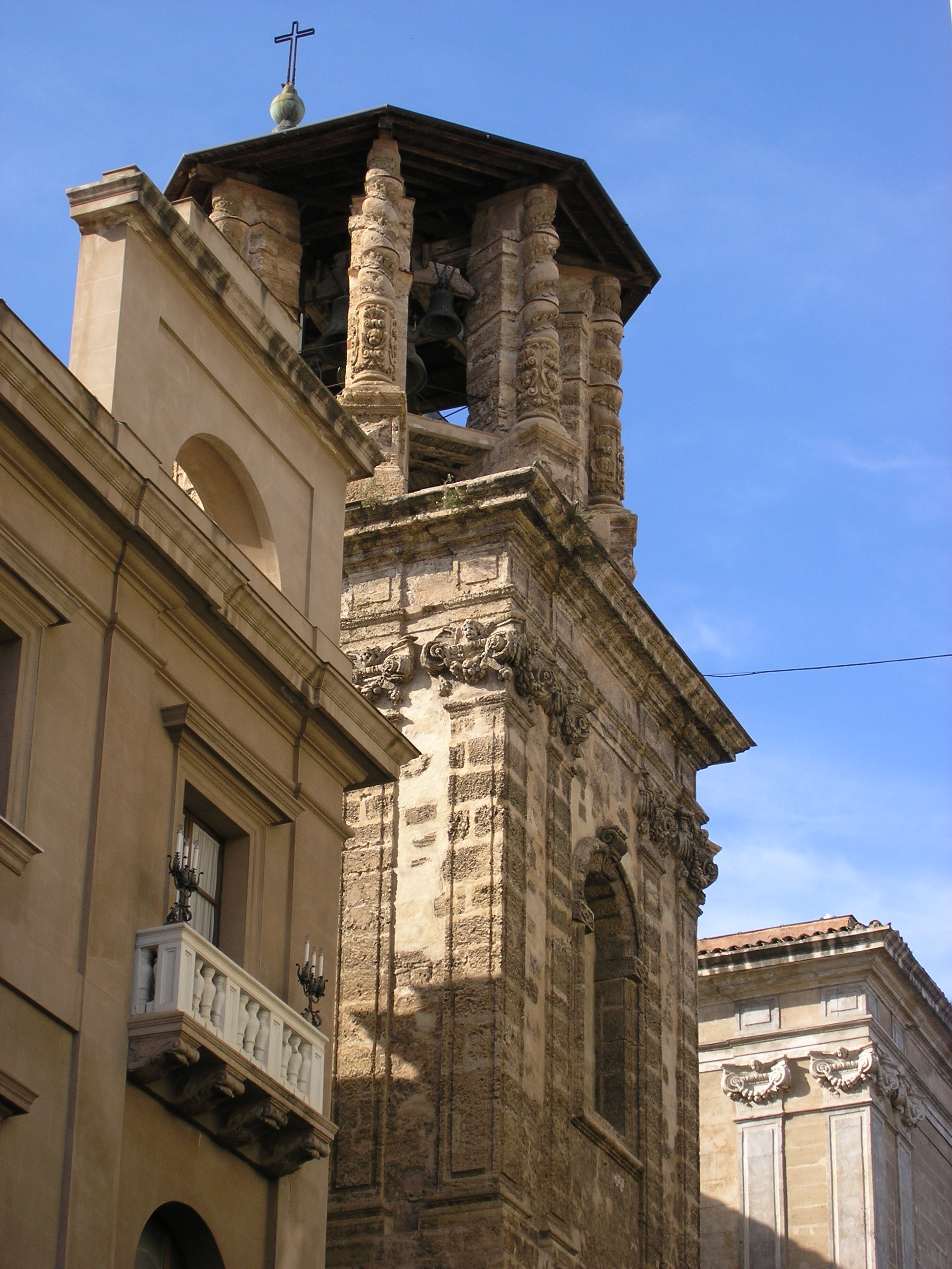 Sicilianu: Crèsia di San Giuseppi dî Teatini